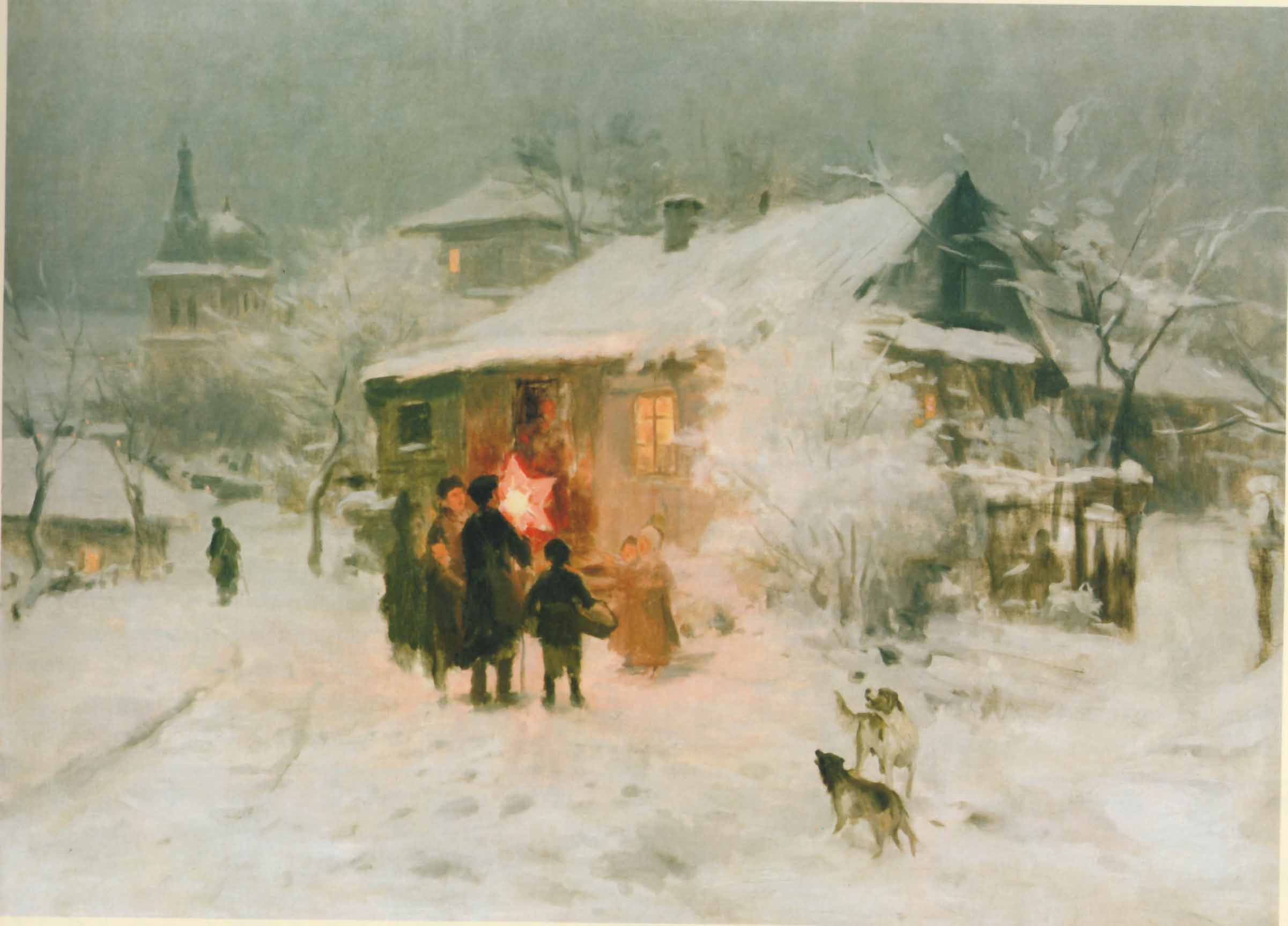 Н. К. Пимоненко. Колядки. Конец XIX в. Херсонкий областной художественный музей им. А.А.Шовкуненко.